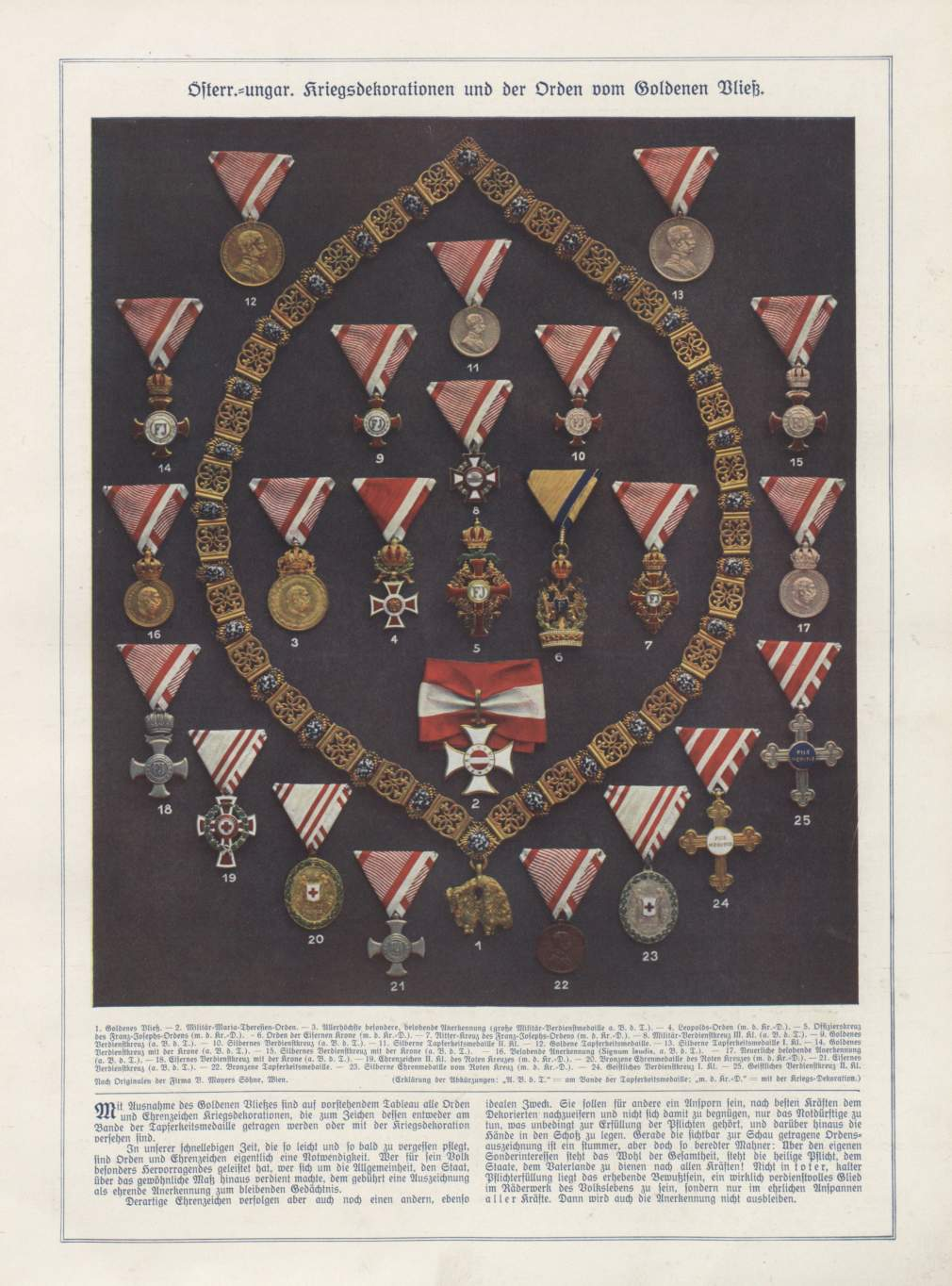 Österreich-Ungarische Kriegsdekorationen und der Orden vom Goldenen Vlies Austro-Hungarian war decorations and the Order of the Golden Fleece